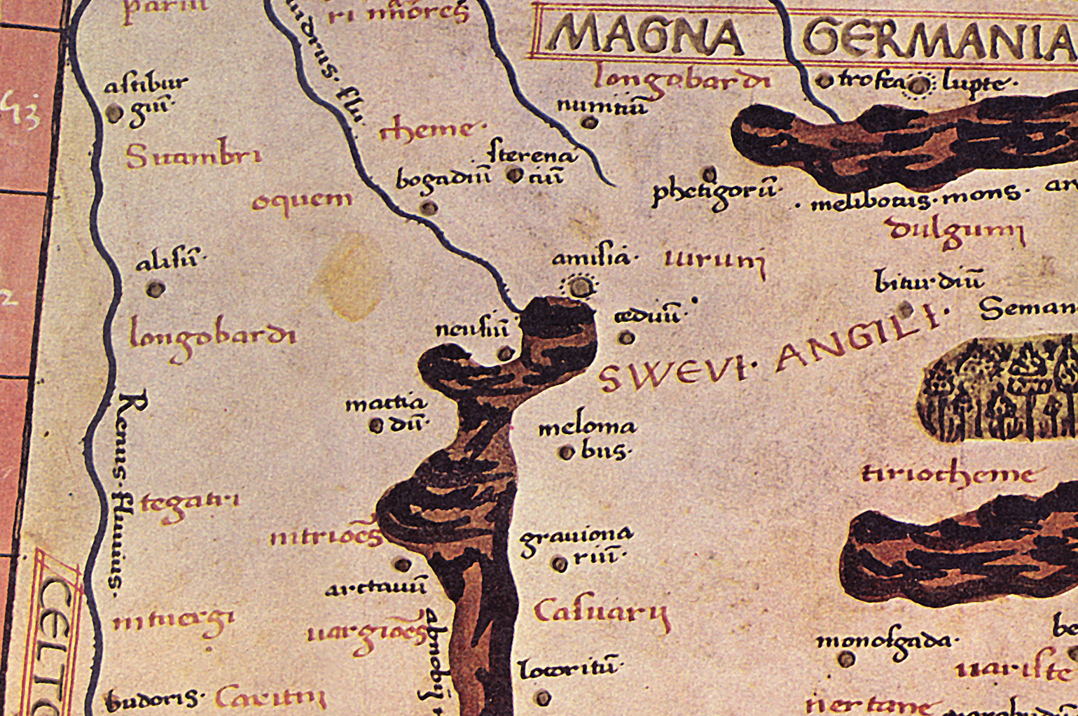 Der Ortsname "Gauonarion" (hier grauionariu), Detailbild von der Karte zur Germania magna.